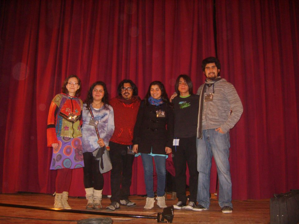 Foto grupal de la banda en el teatro de Vicuña